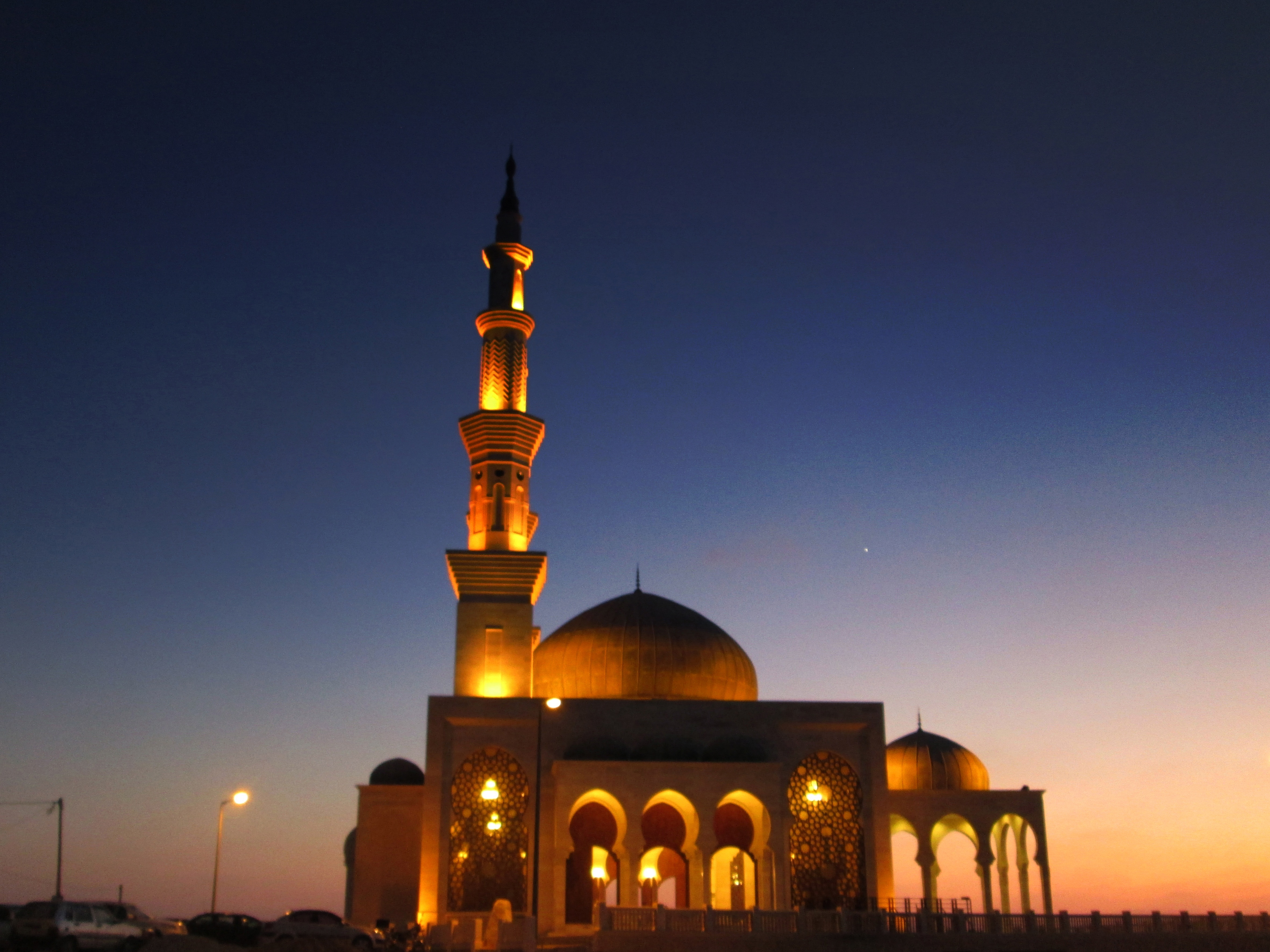 مصرى: مسجد الخالدي أشهر مساجد غزة